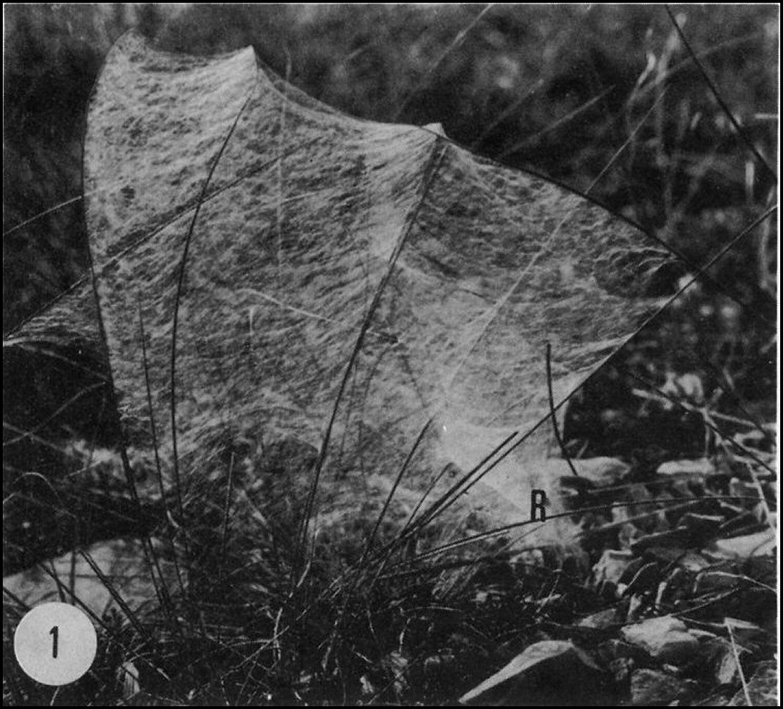 Toile de l' araignée Salticide Pellenes arciger